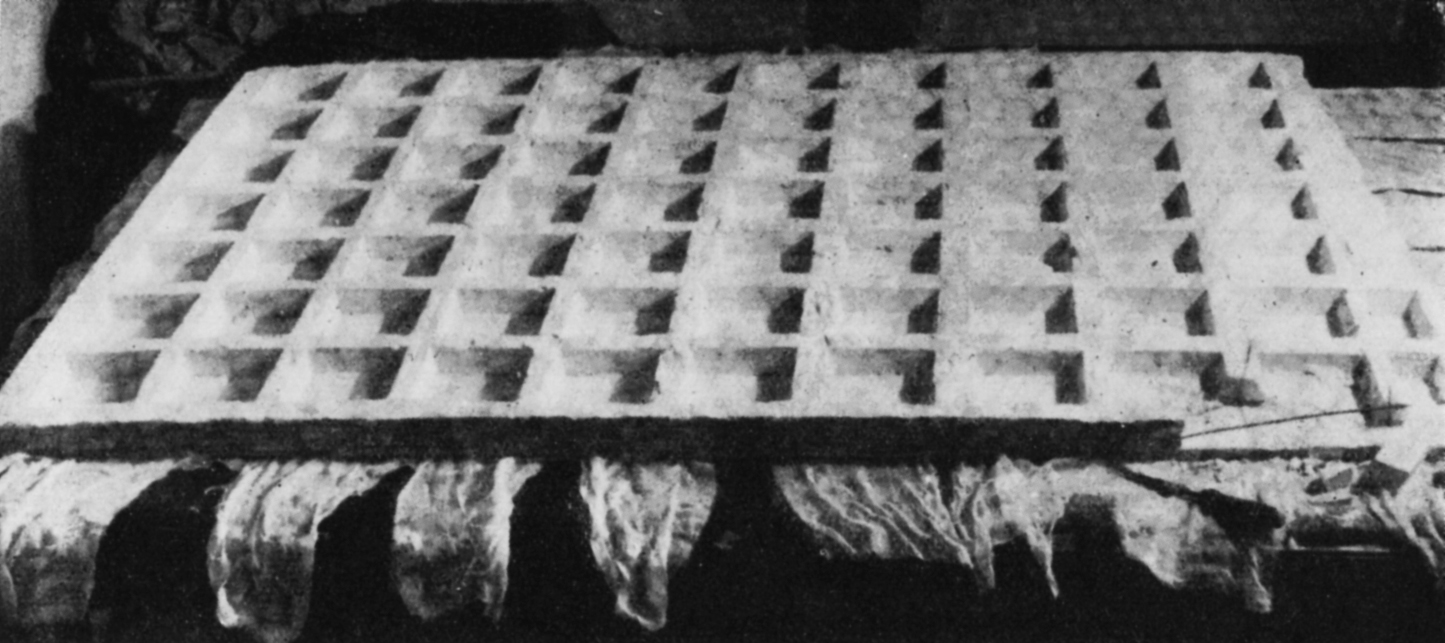 Prace konserwatorskie przy malowidłach z Faras w Muzeum Narodowym w Warszawie. Malowidło anioła po przewiezieniu do Warszawy; kratownica przymocowana do odwrocia malowidła, paski merli przyklejone do lica.